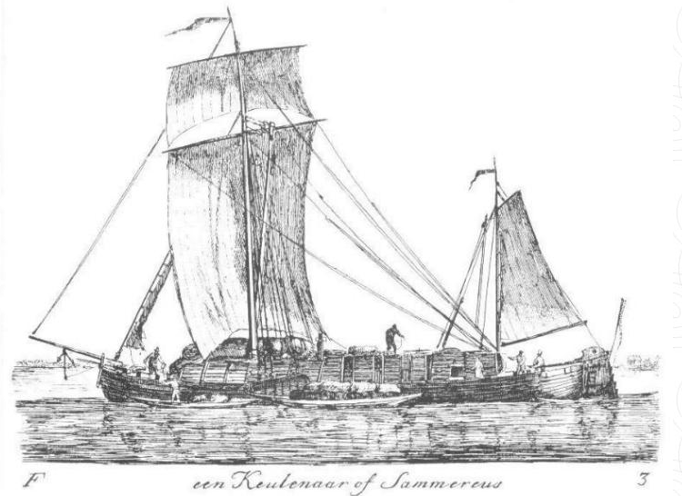 Kunstwerk dateert van 1791, door Gerrit Groenewegen (1754-1826)